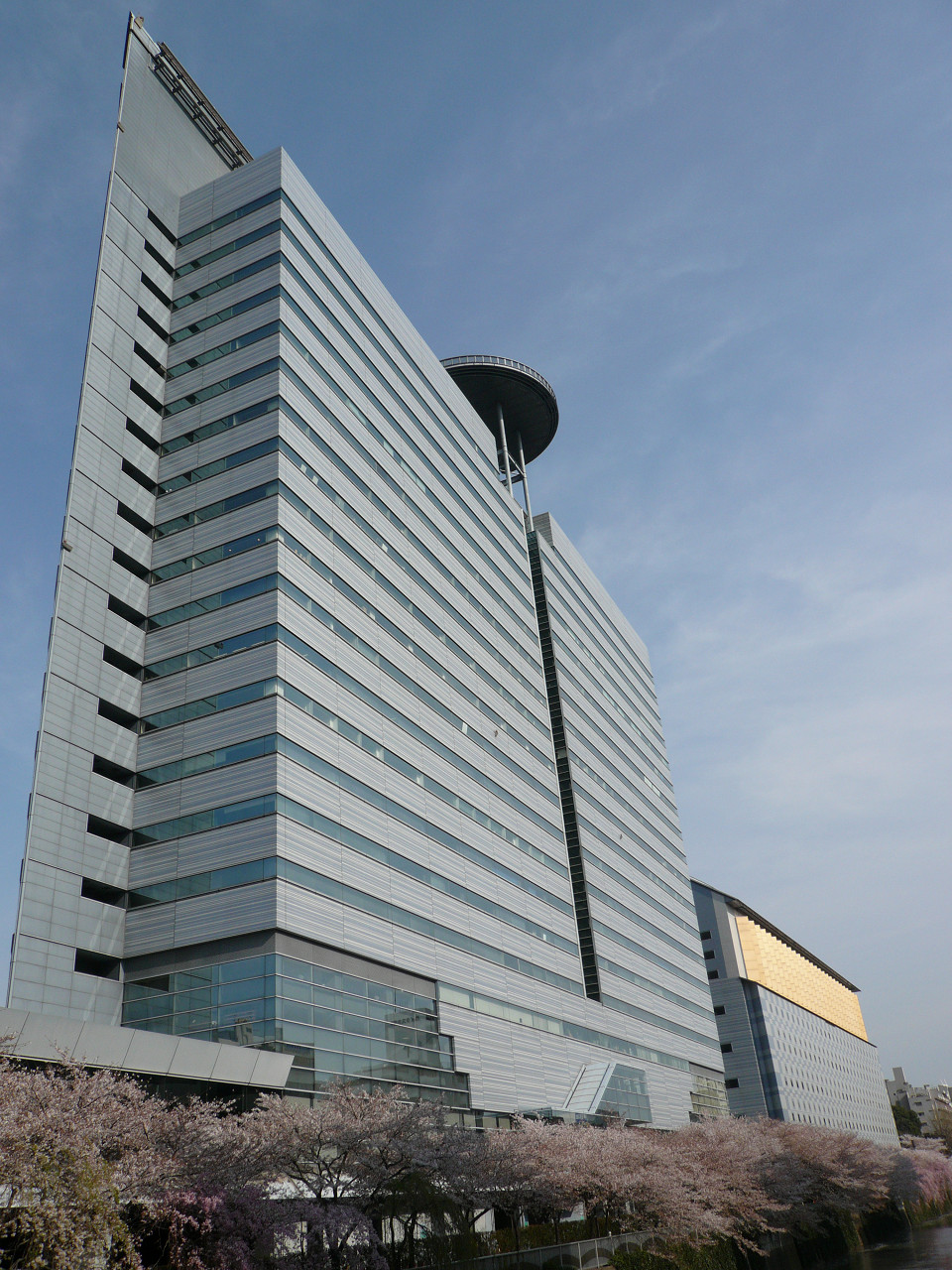 Meguro Gajoen 目黒雅叙園